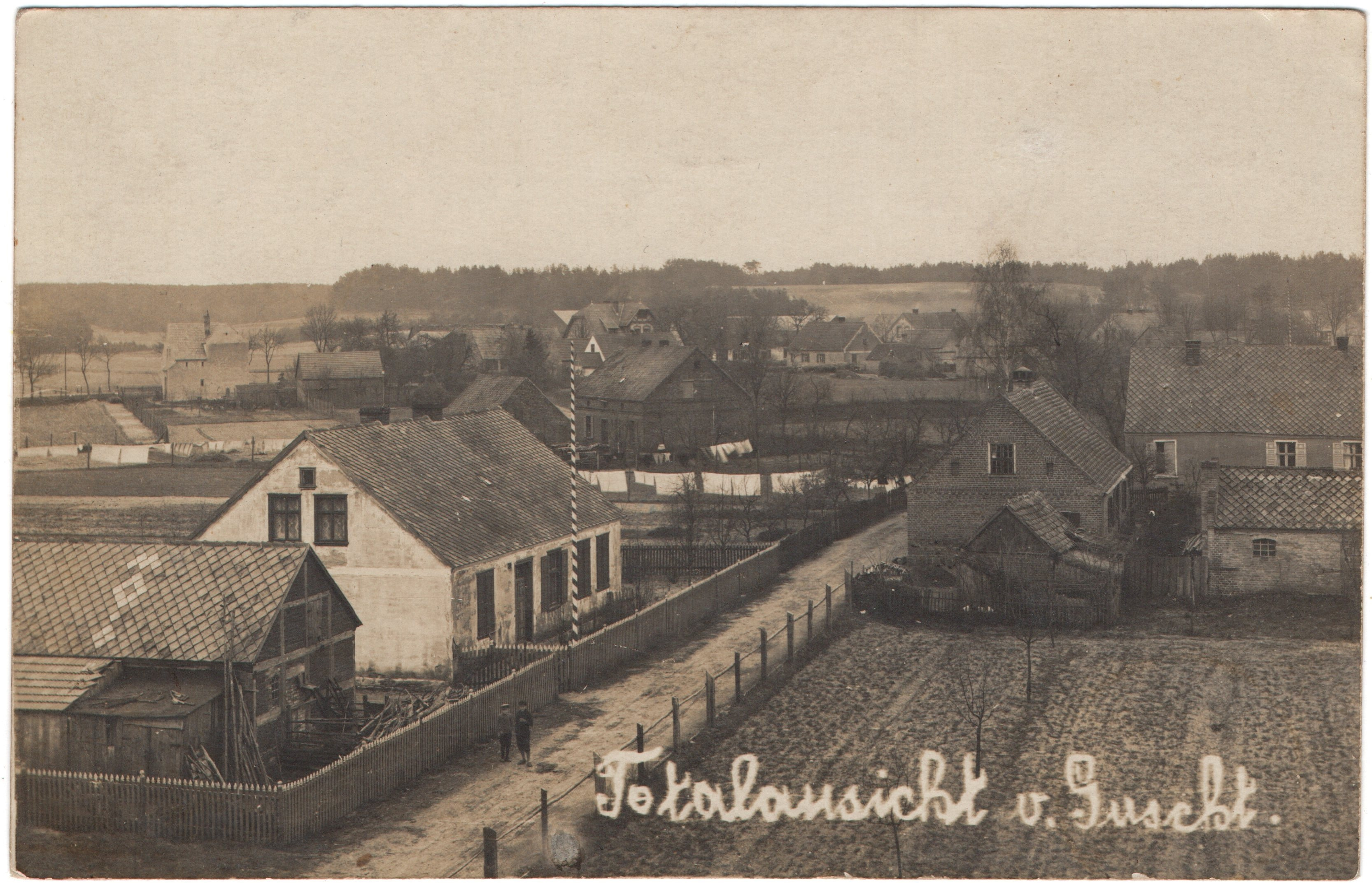 "Totalansicht von Guscht" [Goszczanowo]; gelaufen 22.07.1918